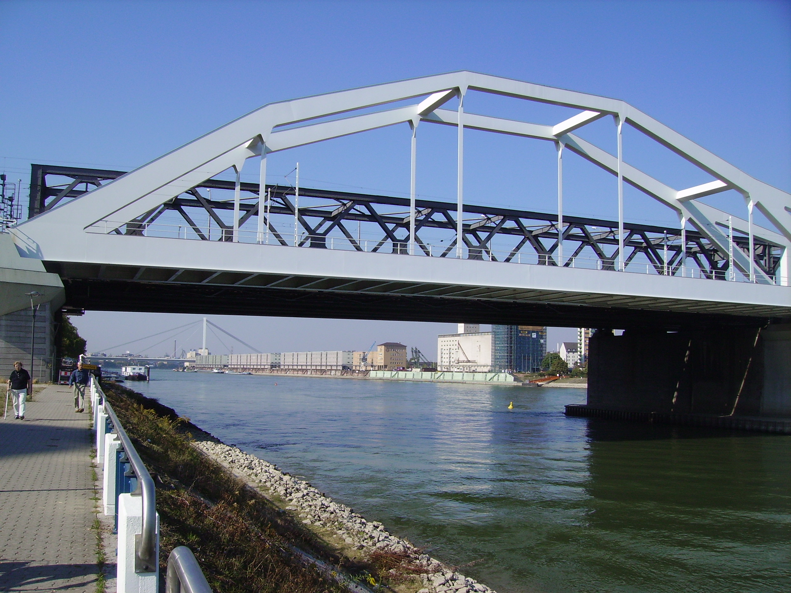 Railway Bridge between Ludwigshafen in Rheinland-Pfalz and Mannheim in Baden-Württemberg, Germany (photo shows view from Ludwigshafen)